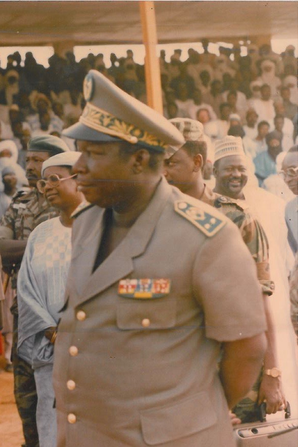 President of Niger, Ali Saibou. Cropped from File:Bagnou Beido Niger.JPG